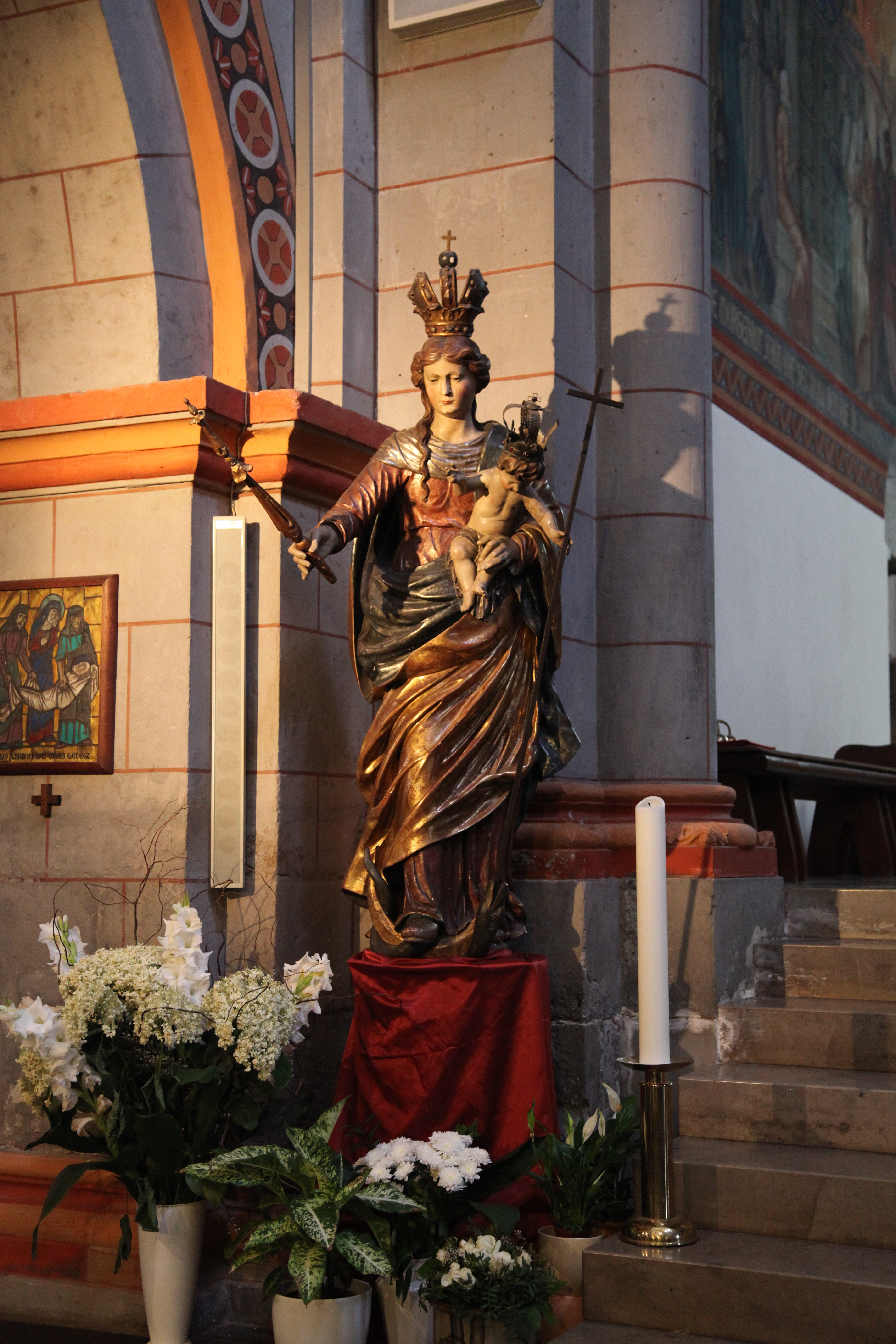 Maria Himmelfahrt / Liebfrauenkirche an der Agrippastraße in Andernach